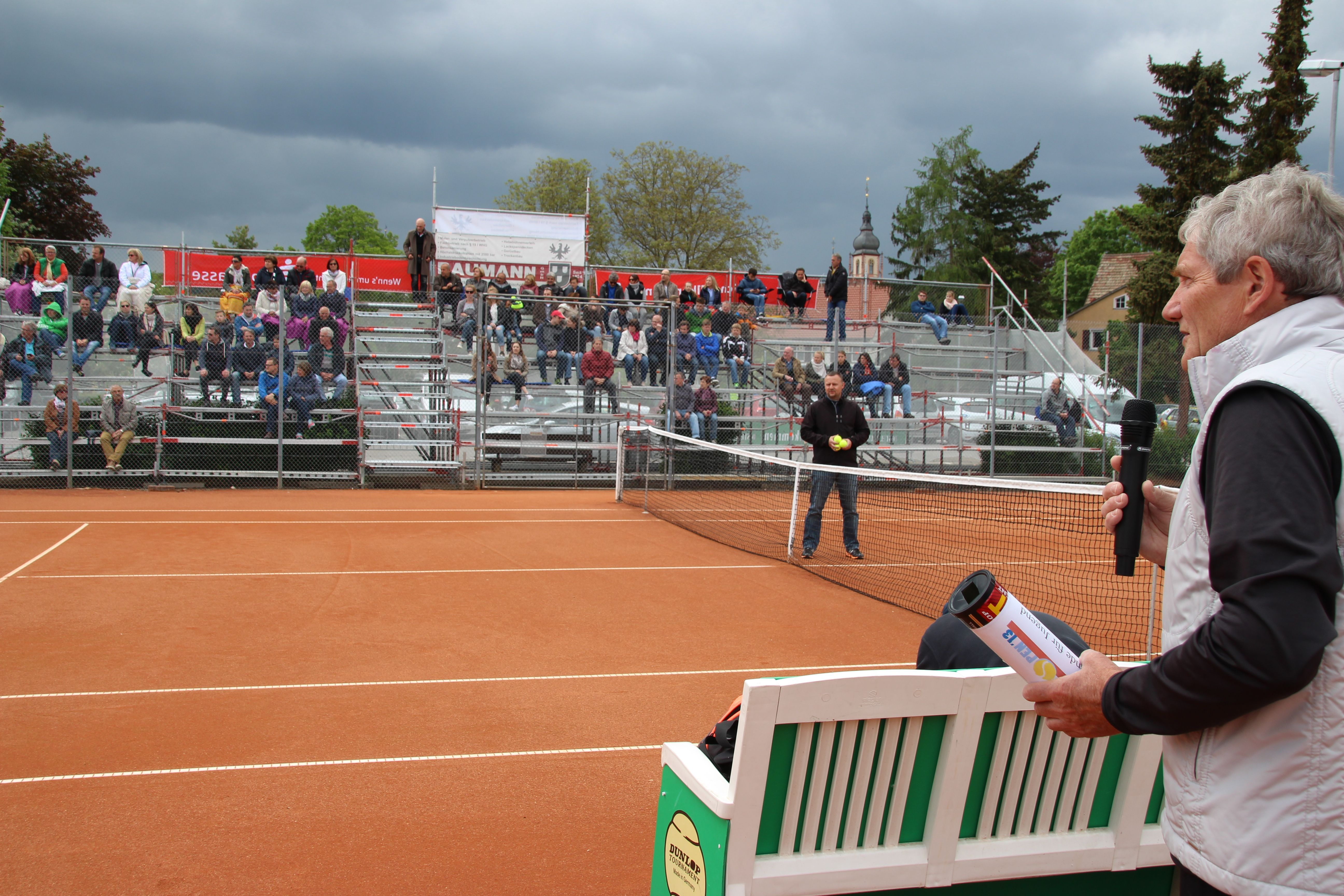 TBB Open 2016 Mit den „TBB Open“ veranstaltet die Tennisabteilung des TSV Tauberbischofsheim seit den 1990er-Jahren ein jährlich stattfindendes Sandplatzturnier mit bis zu 64 Spielern, bei dem Punkte für die Tennisrangliste des Deutschen Tennis Bundes errungen werden können. Dort nahmen bereits Weltranglistenspieler wie Michael Kohlmann oder Florian Mayer teil.